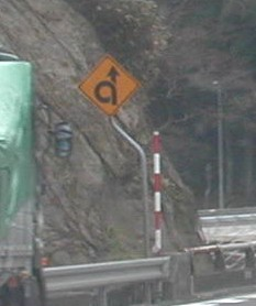 ループ橋標識